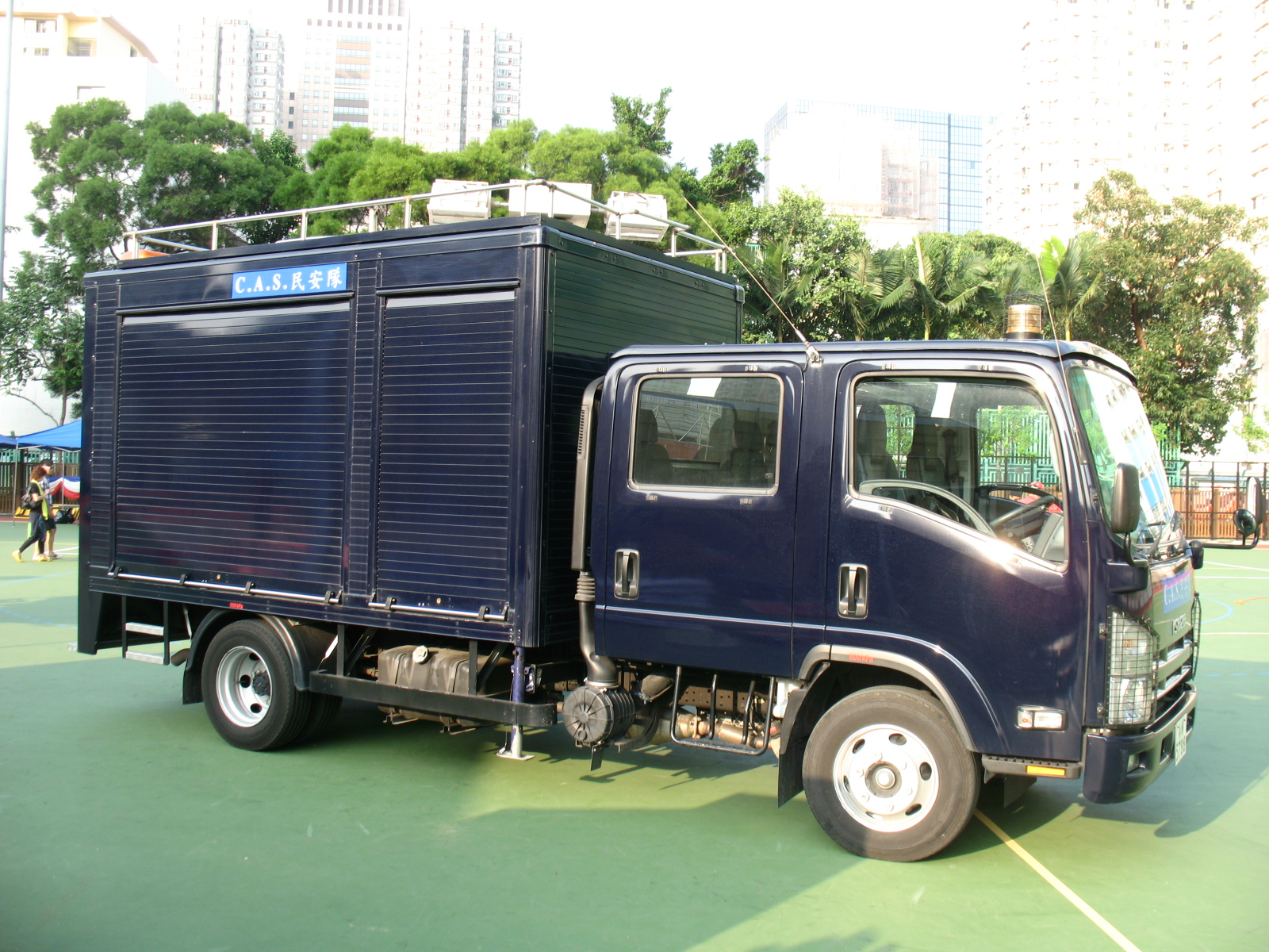 中文（香港）: 民眾安全服務隊的照明發電車，屬於民安隊緊急救援中隊，結合了照明和發電功能，內置發電機以生產電源，此車型號是五十鈴NP型輕型貨車（雙排座式）。